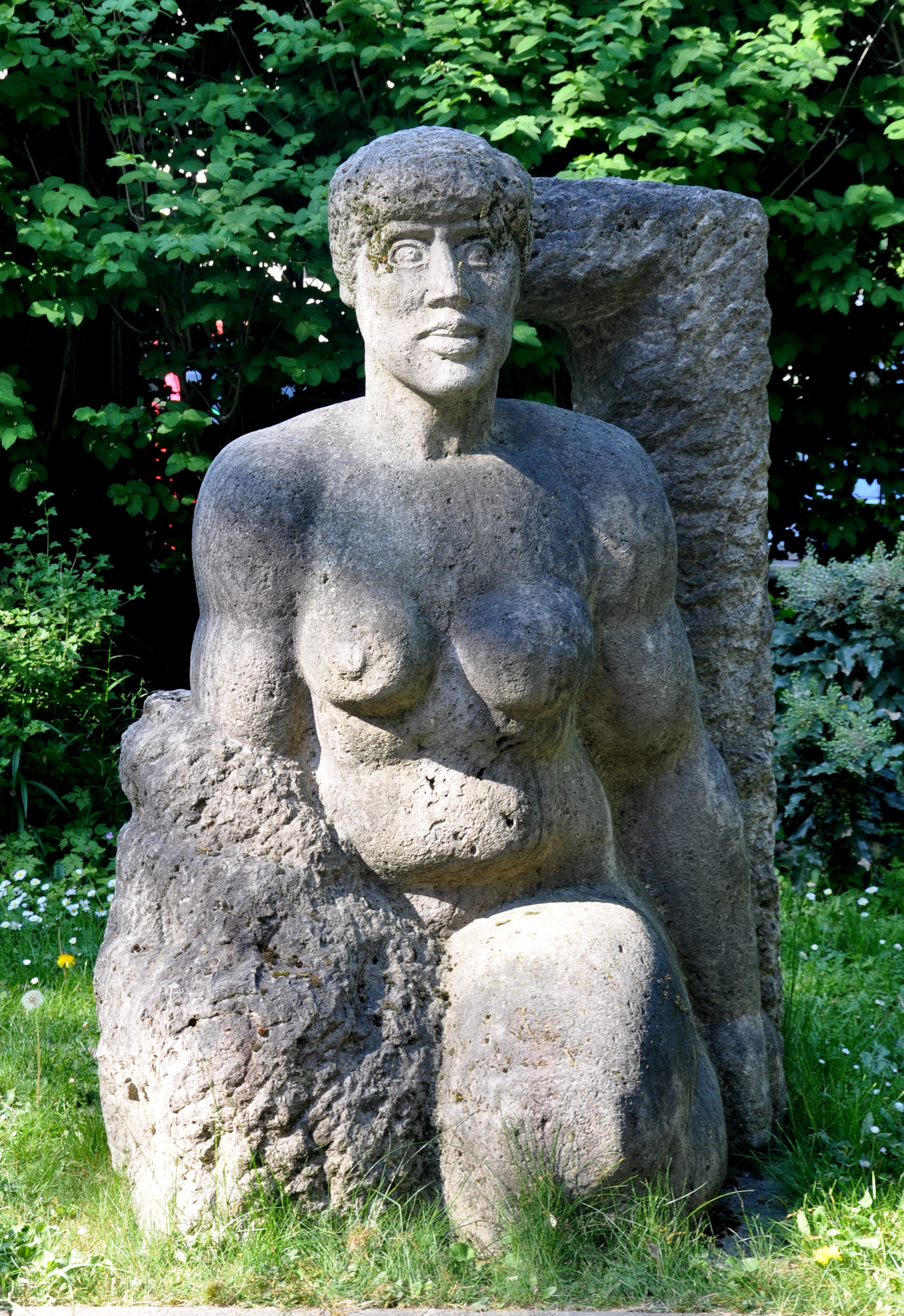 Frankfurt am Main, Skulpturengarten des Städel, Gustav Heinrich Wolff (1886–1934): Brunnenfigur Narziss, 1928/1929, Kirchheimer Muschelkalk, erworben 1951 als Geschenk der Erben Dr. Carl Hagemann, Inv. Nr. St. P. 375